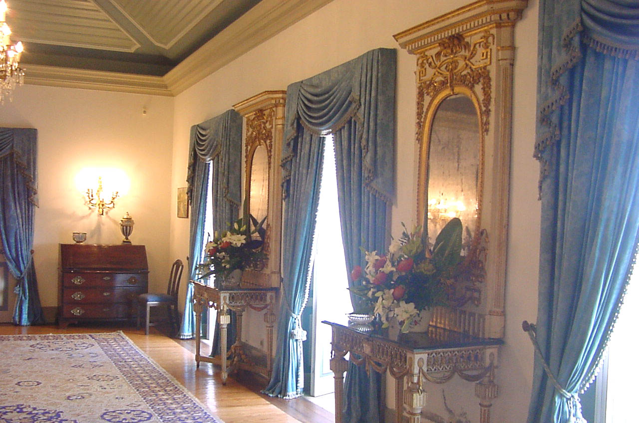 Salão